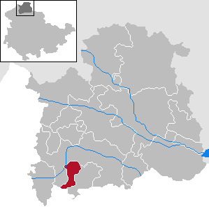 Gemeinde Niedergebra in Thüringen, Landkreis Nordhausen